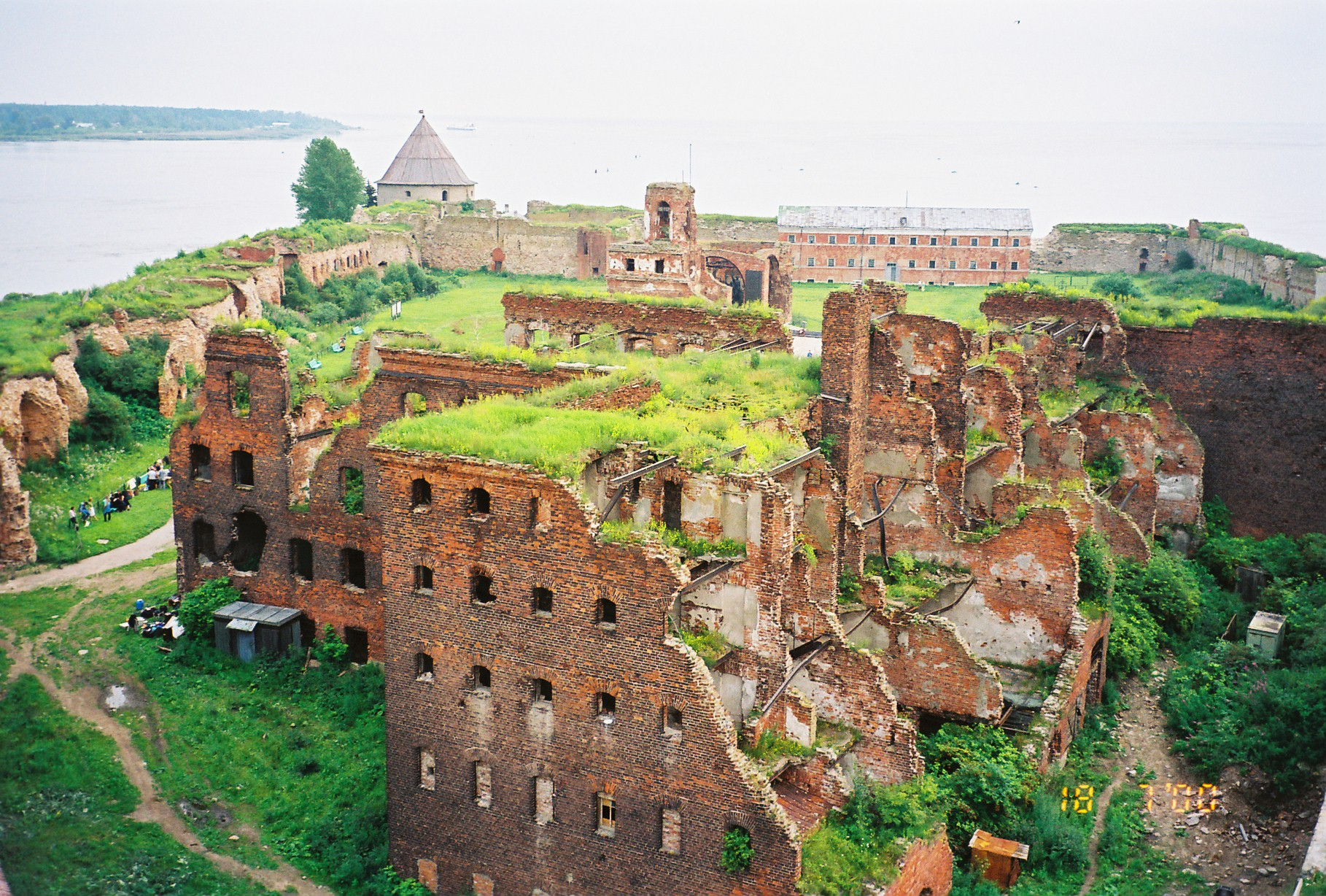 Общий вид внутреннего пространства крепости Орешек